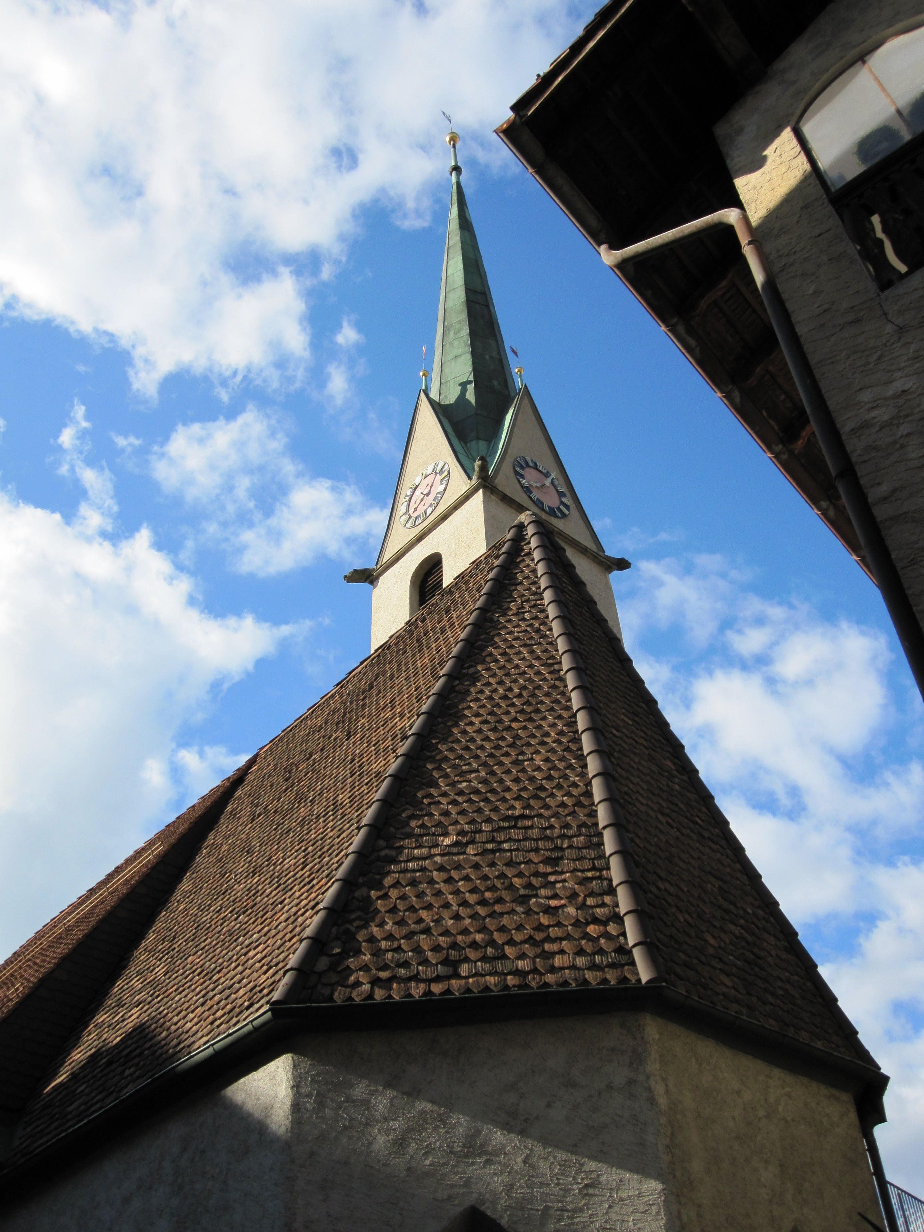 die reformierte Regulakirche in Chur (Kanton Graubünden)